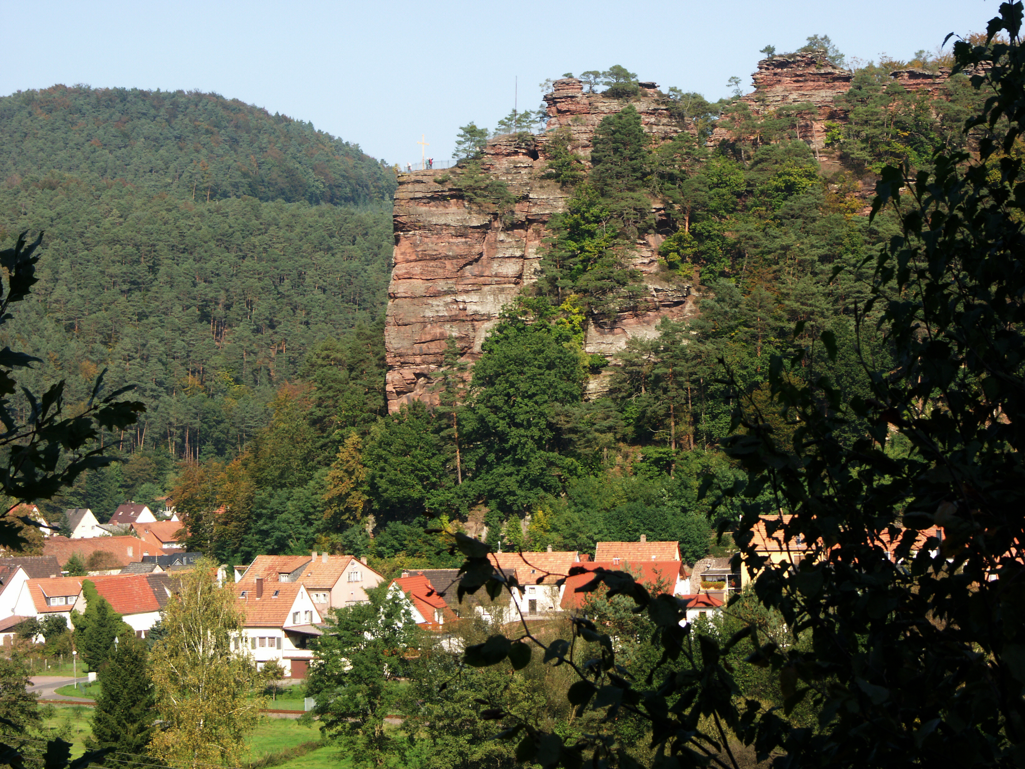 Deutschland, Rheinland-Pfalz, Dahn, Jungfernsprung.